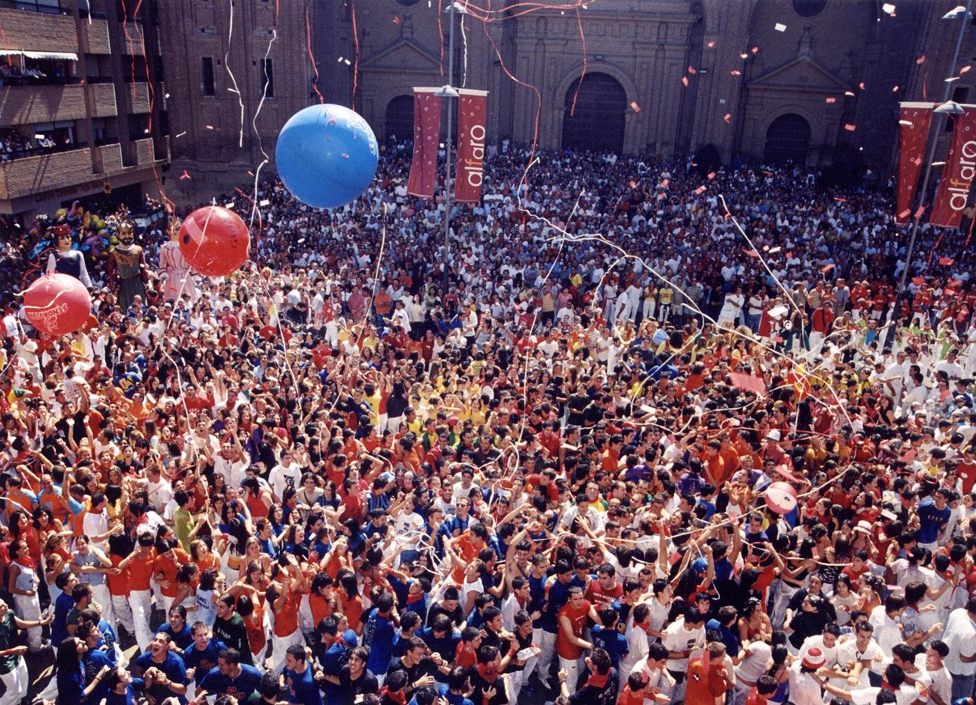 Fiestas de S. Roque y S. Ezequiel, Alfaro Foto general de la Plaza de España (Alfaro, La Rioja, España) en fiestas